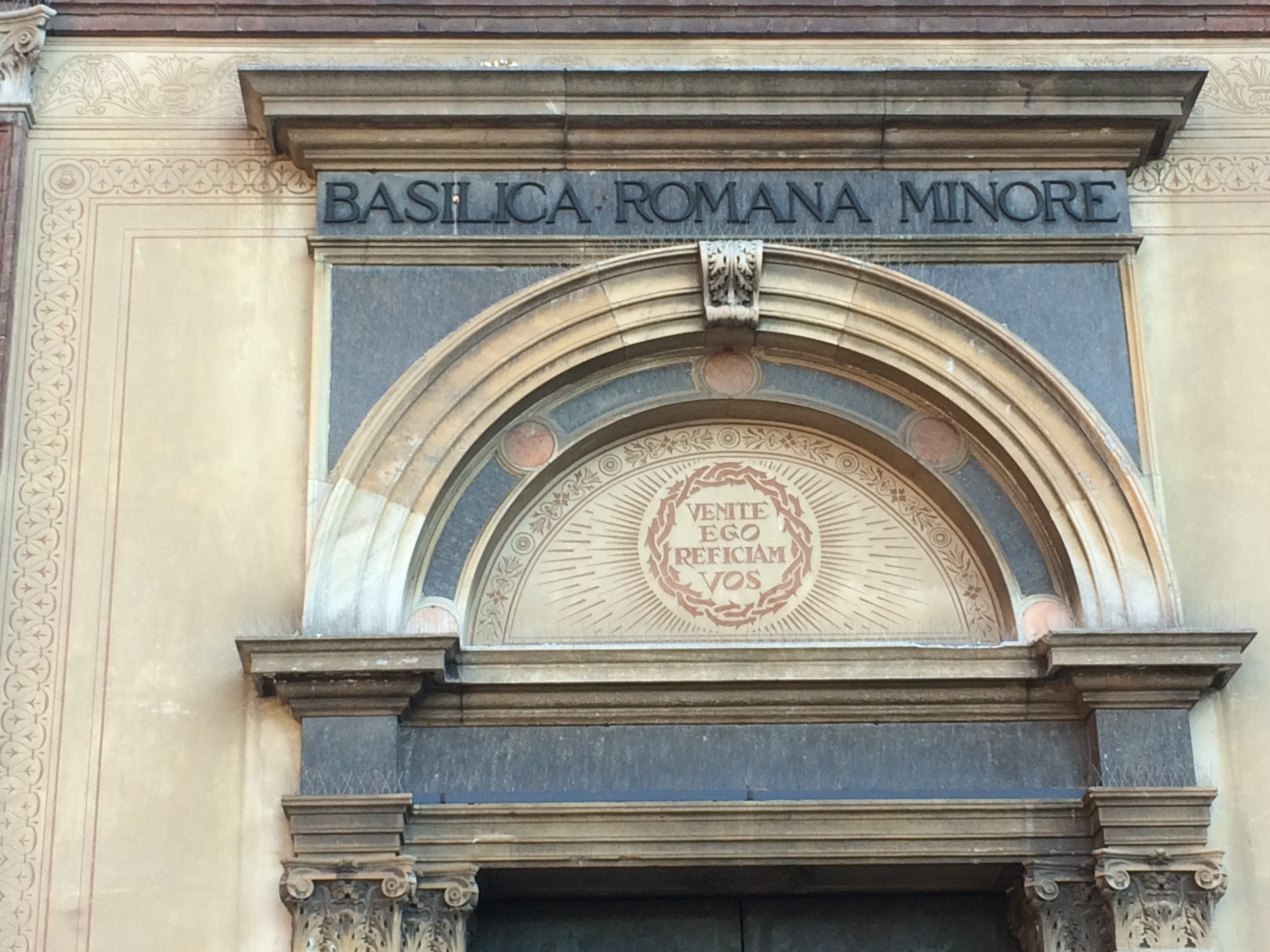 L'iscrizione presente sopra la porta principale d'ingresso della basilica di San Magno